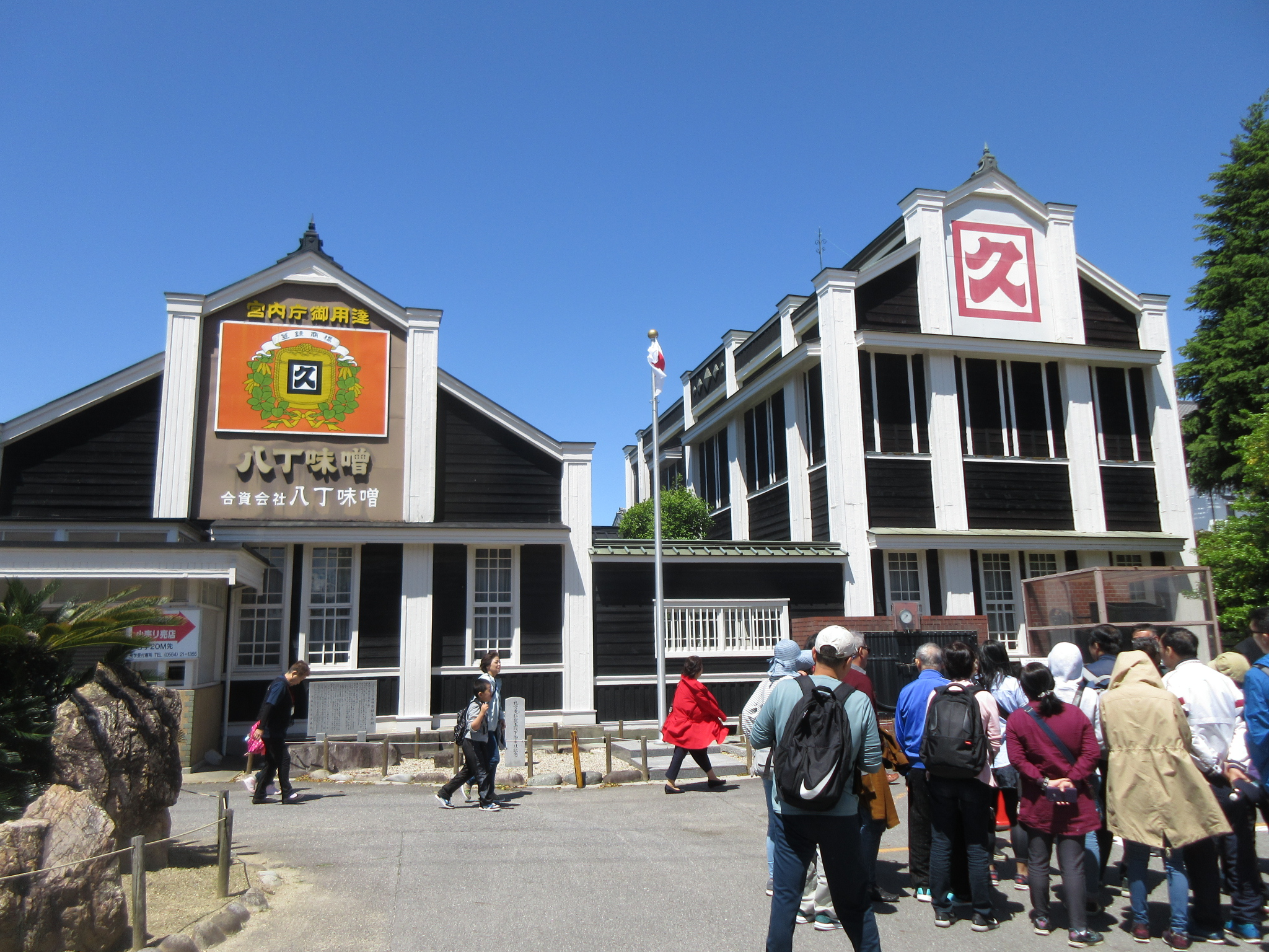 合資会社八丁味噌（岡崎市八帖町）